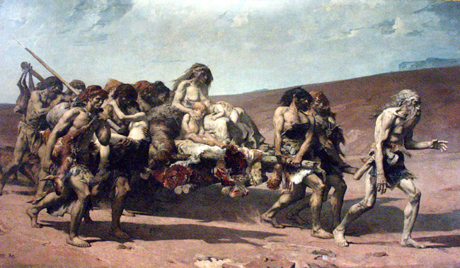 Caïn, l'œil hagard, conduit sa tribu accablée par la sentence de Jéhovah. Ses fils portent un brancard de bois sur lequel se tiennent une femme effarée et ses enfants assoupis, et d'où pendent des morceaux de viande sanglante.